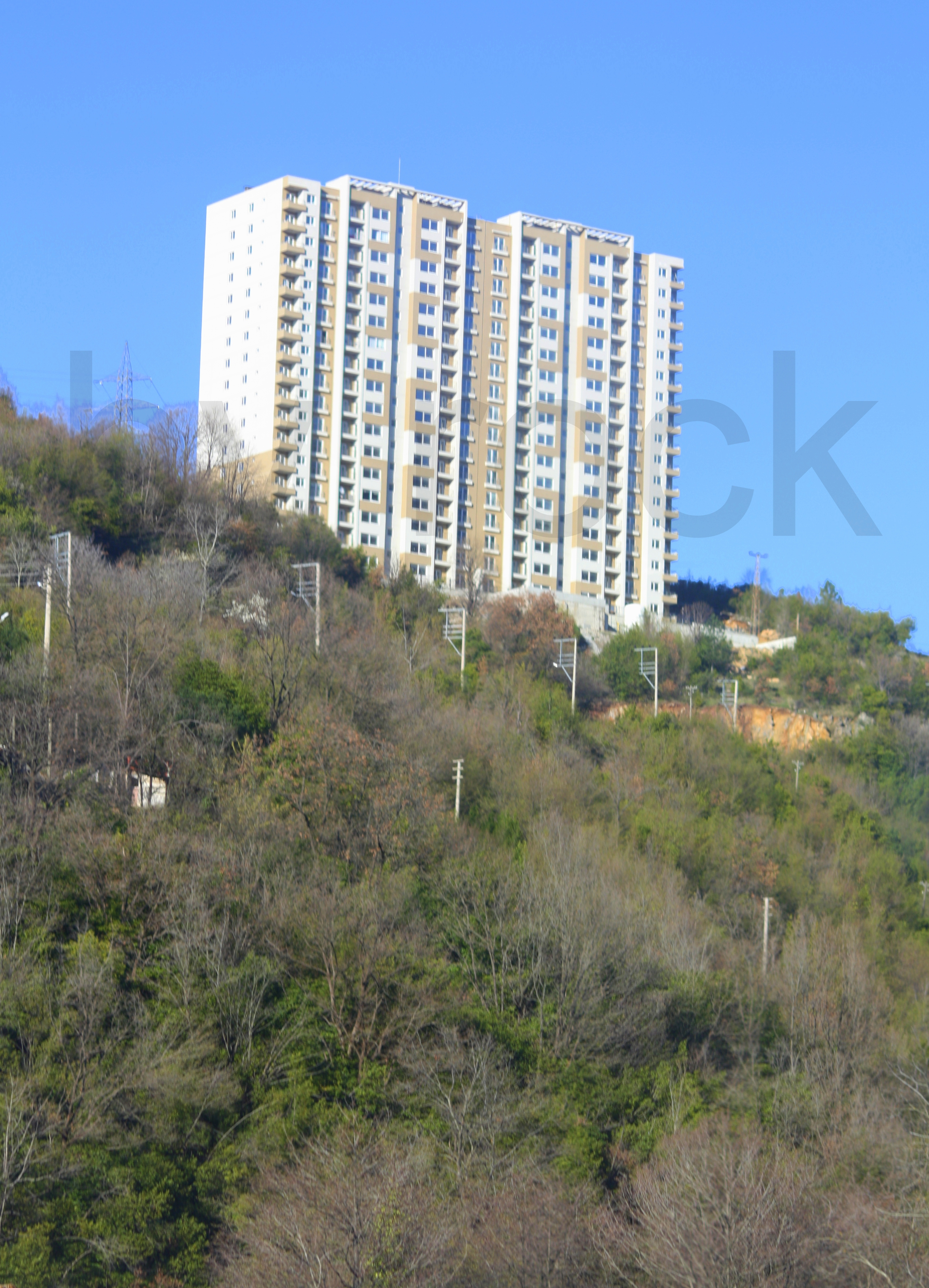 Dağların tepesindek, lojmanlar